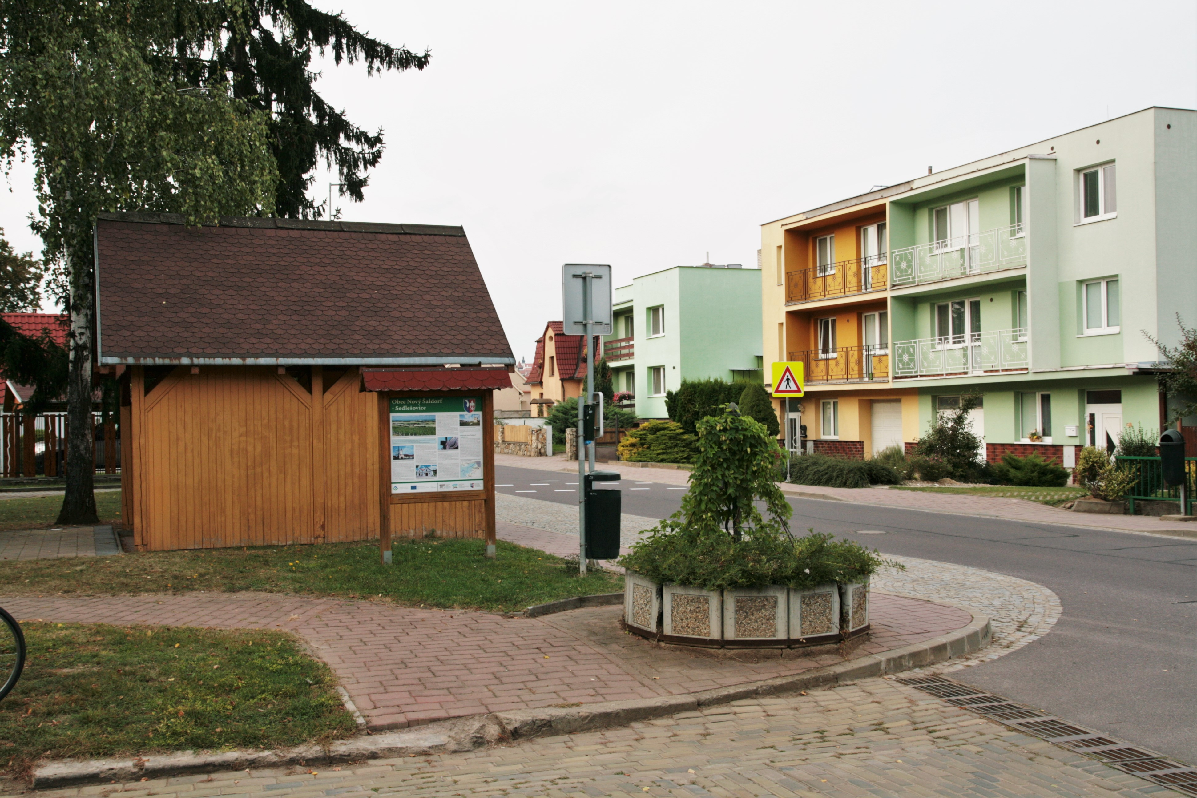 Sedlešovice, část obce Nový Šaldorf - Sedlešovice v okrese Znojmo. Autobusová zastávka v ulici.